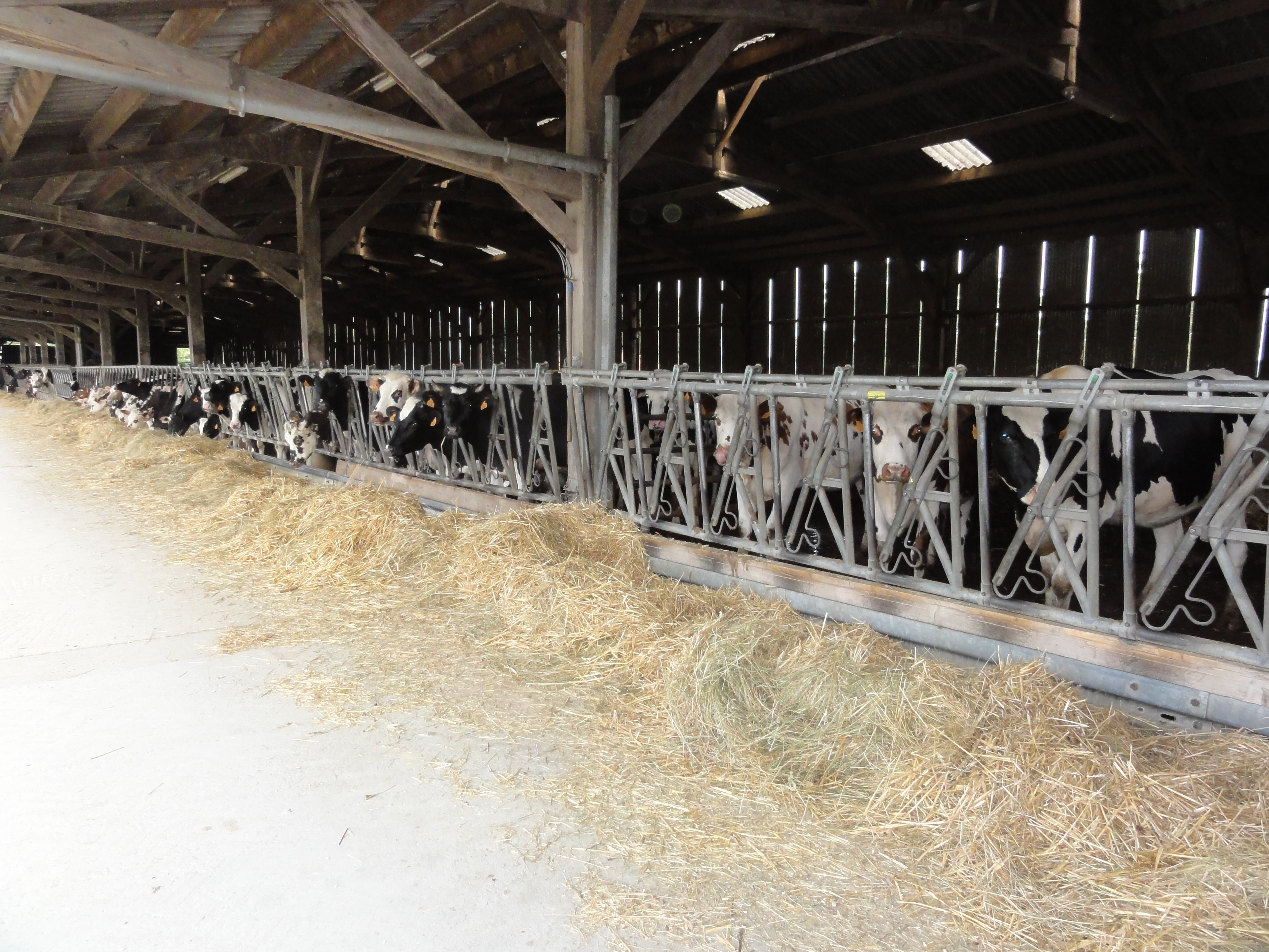 Saint-Christophe-du-Jambet (Sarthe) hameau Les Jeunoires, étable de vaches